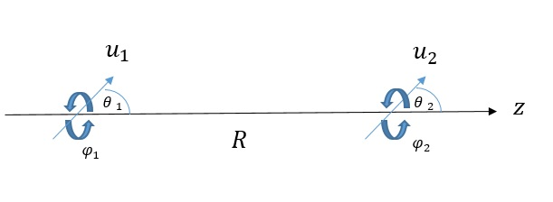 איור 3: אינטרקציית קיסום שמאפיינת שתי מולקולות עם דיפול קבוע בגודלו ואוריאנטציה משתנה בזמן ליחס לציר המחבר בין מרכזן